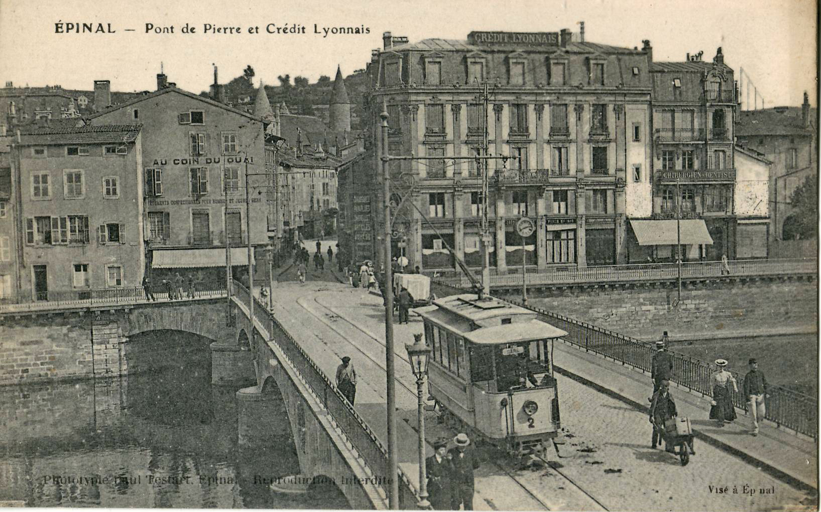 Carte postale ancienne éditée par Phototypie Paul Testard à Épinal : ÉPINAL - Pont de Pierre et Crédit Lyonnais